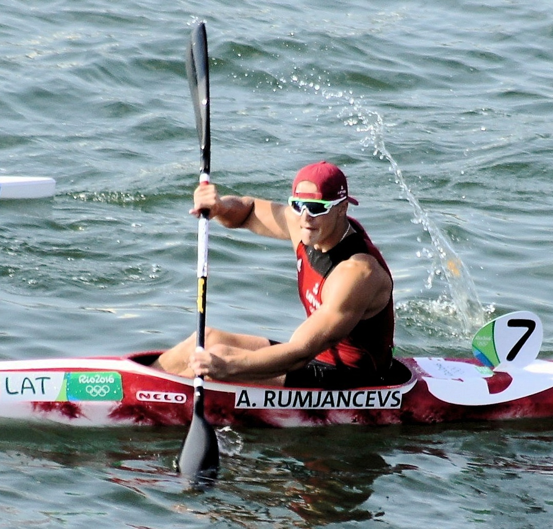 Rio 2016. Canoagem de velocidade/Canoe sprint